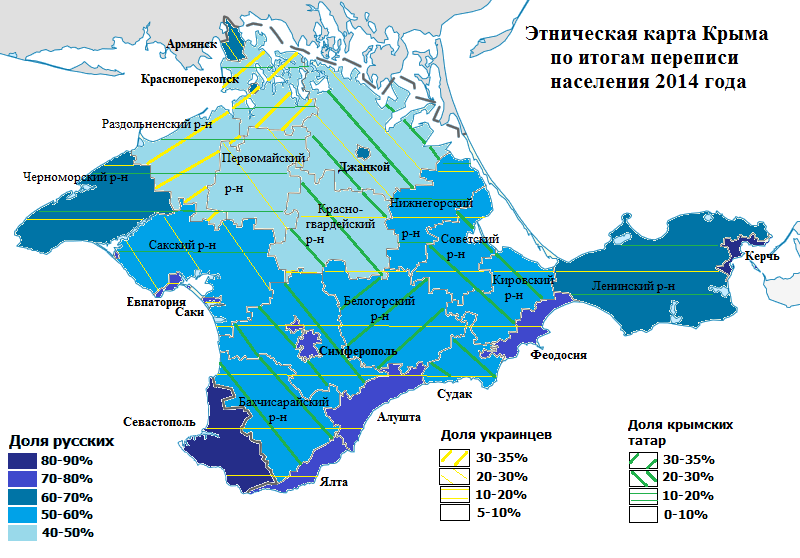 Этническая карта Крыма по итогам переписи населения в Крымском федеральном округе 2014 года